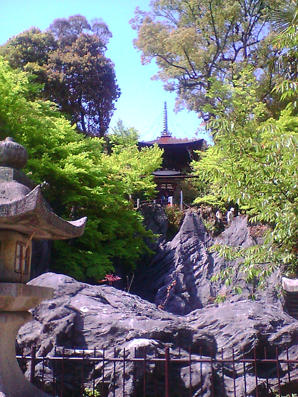 滋賀県 石光山石山寺